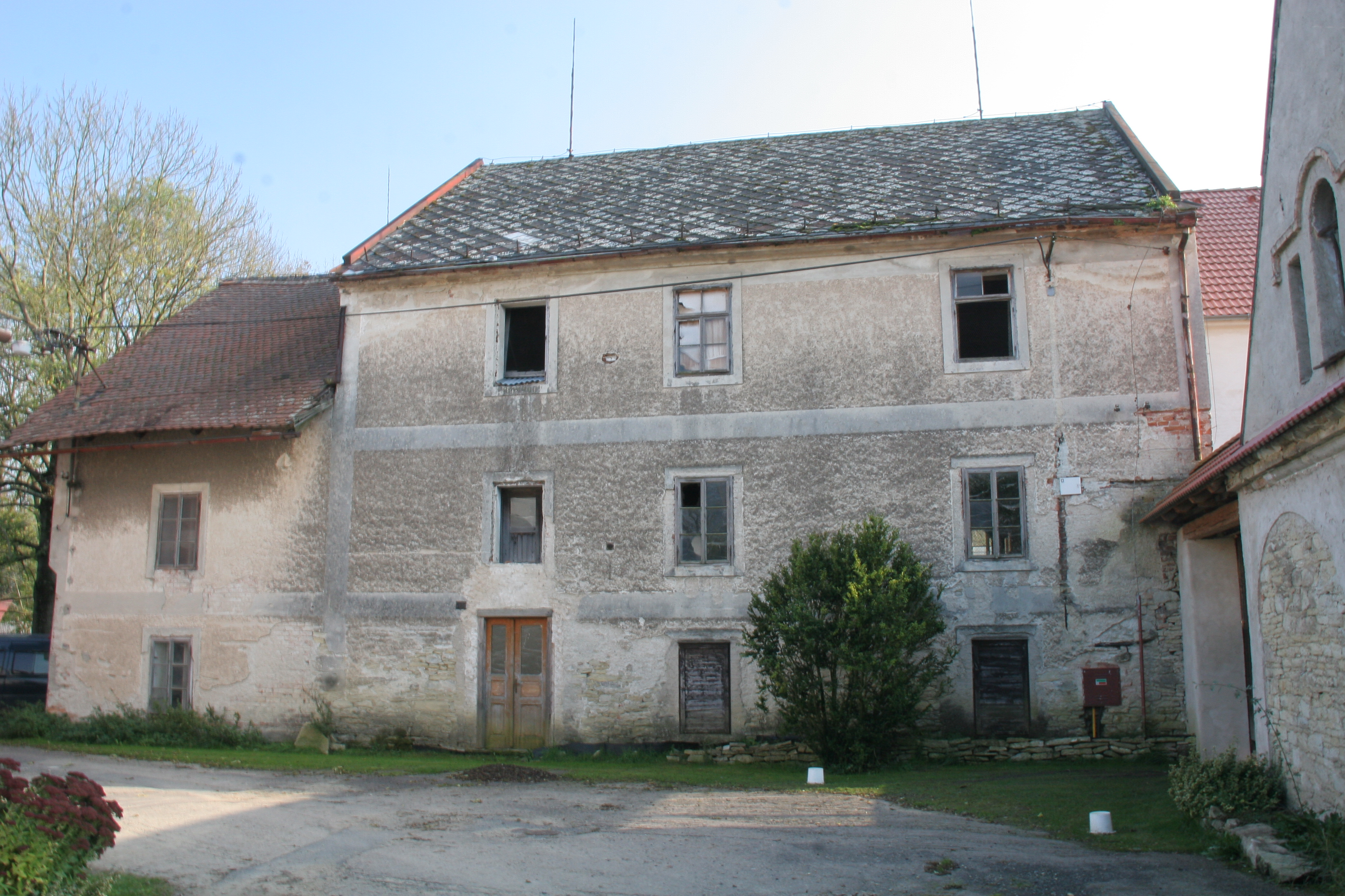 Sedlíšťka mlýn